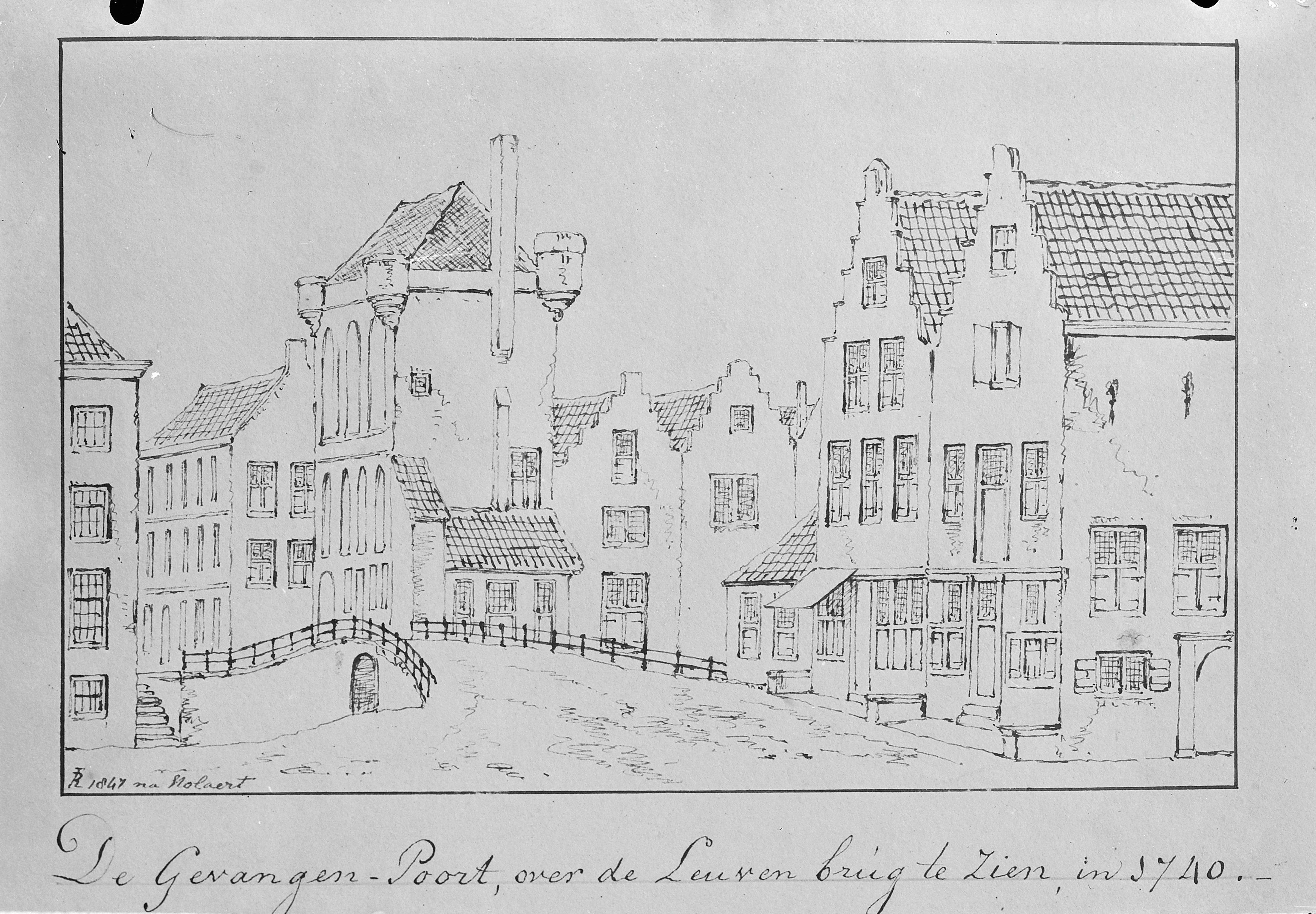 Gevangenpoort: Pentekening van de gevangenpoort, N. poort